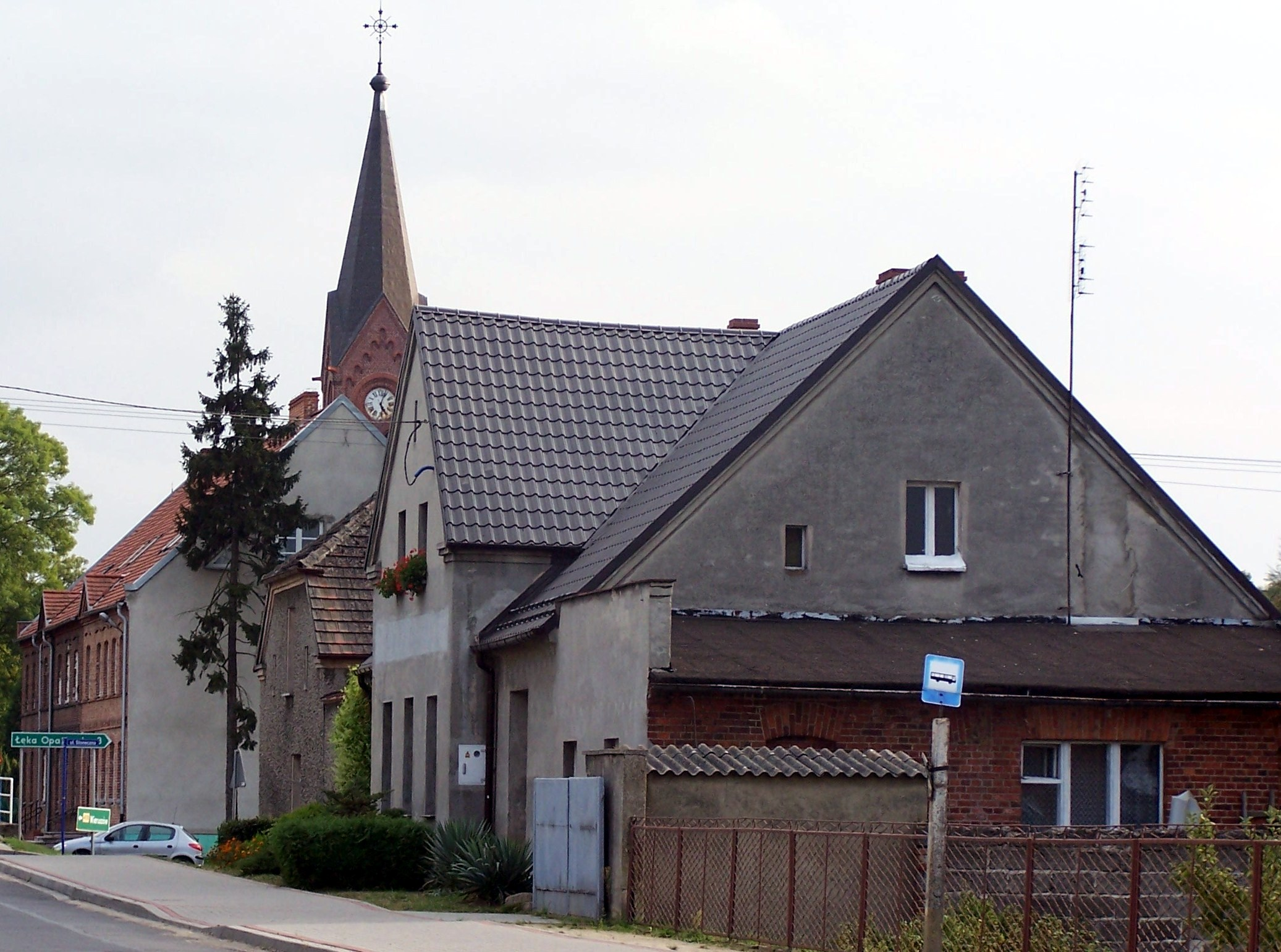 Opatów (województwo wielkopolskie)